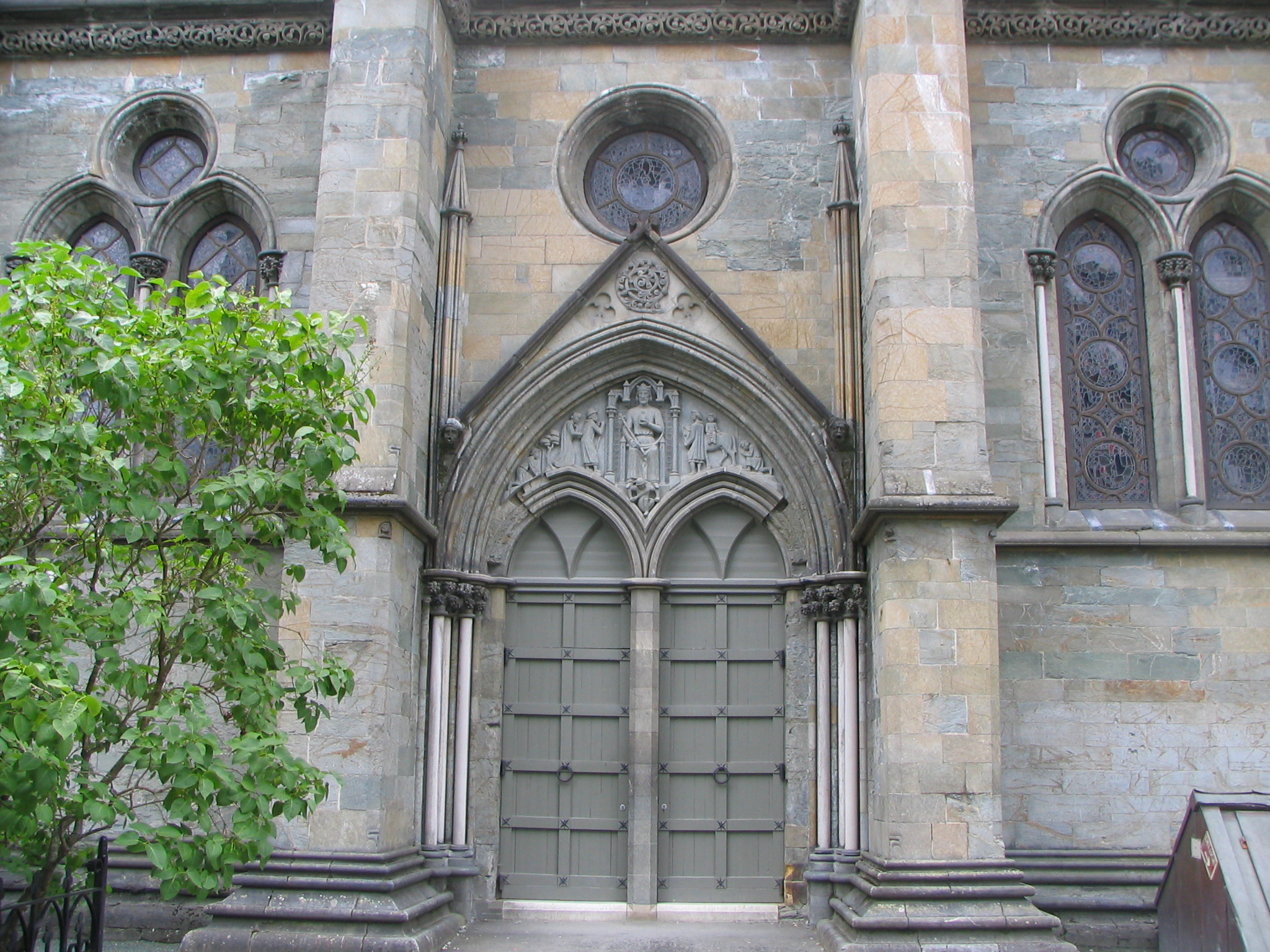 Port, Nidarosdomen (foto:Finn Bjørklid)